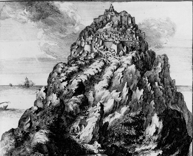 Xombourgo on Tinos 1703